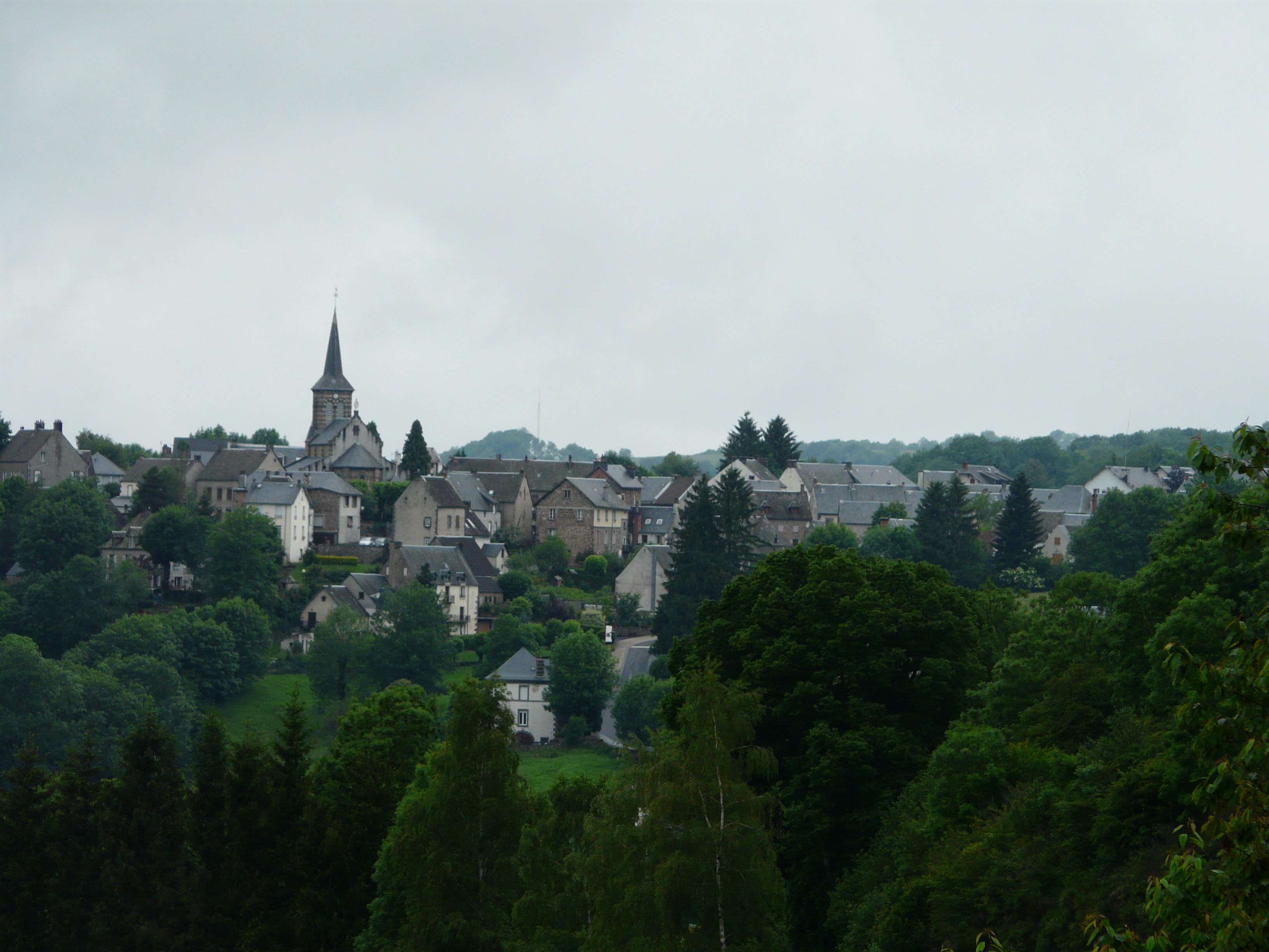 Le village de Saint-Sauves-d'Auvergne, Puy-de-Dôme, France.